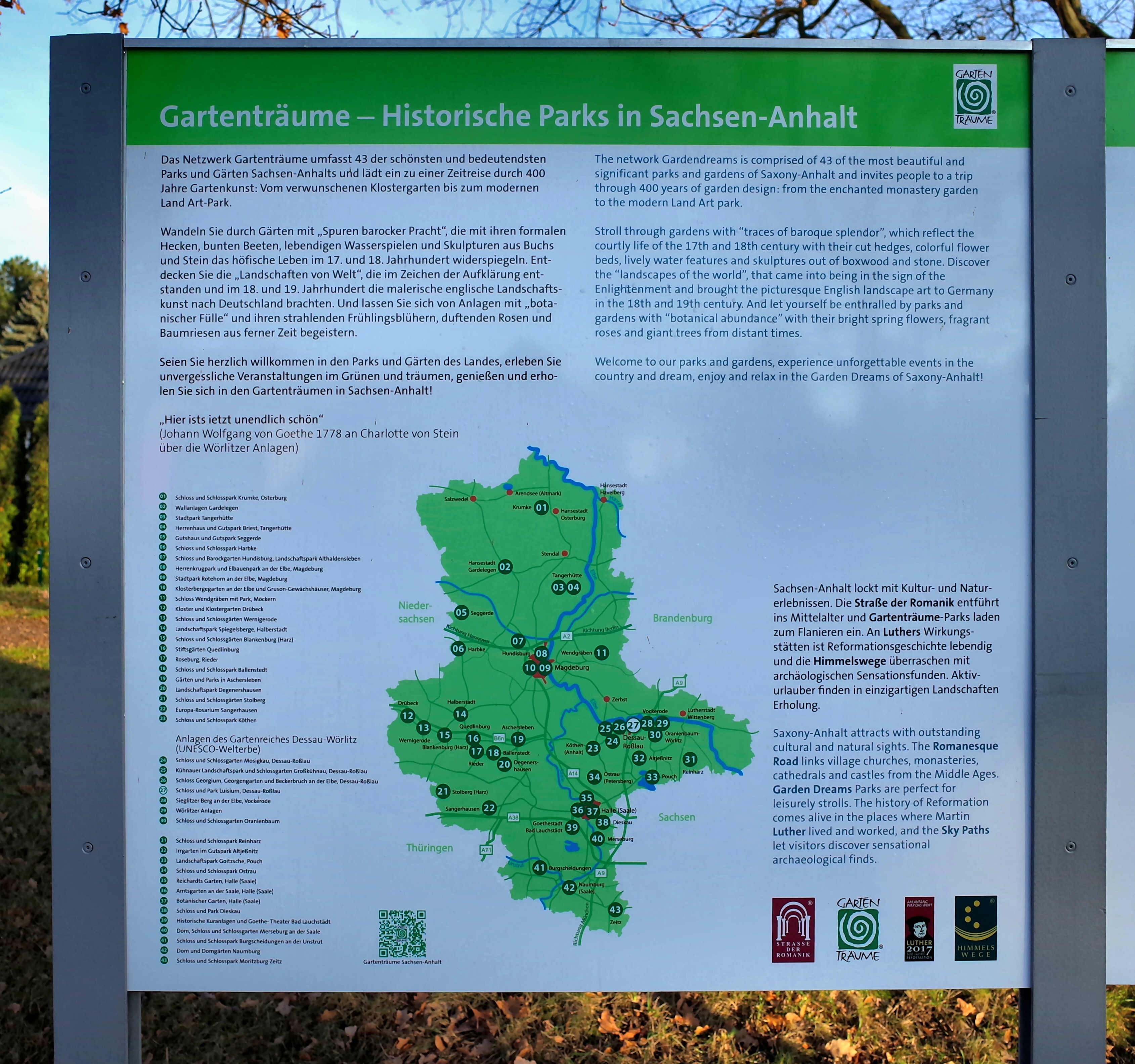 Dessau-Roßlau, Informationstafel Gartenträume - Historische Parks in Sachsen-Anhalt